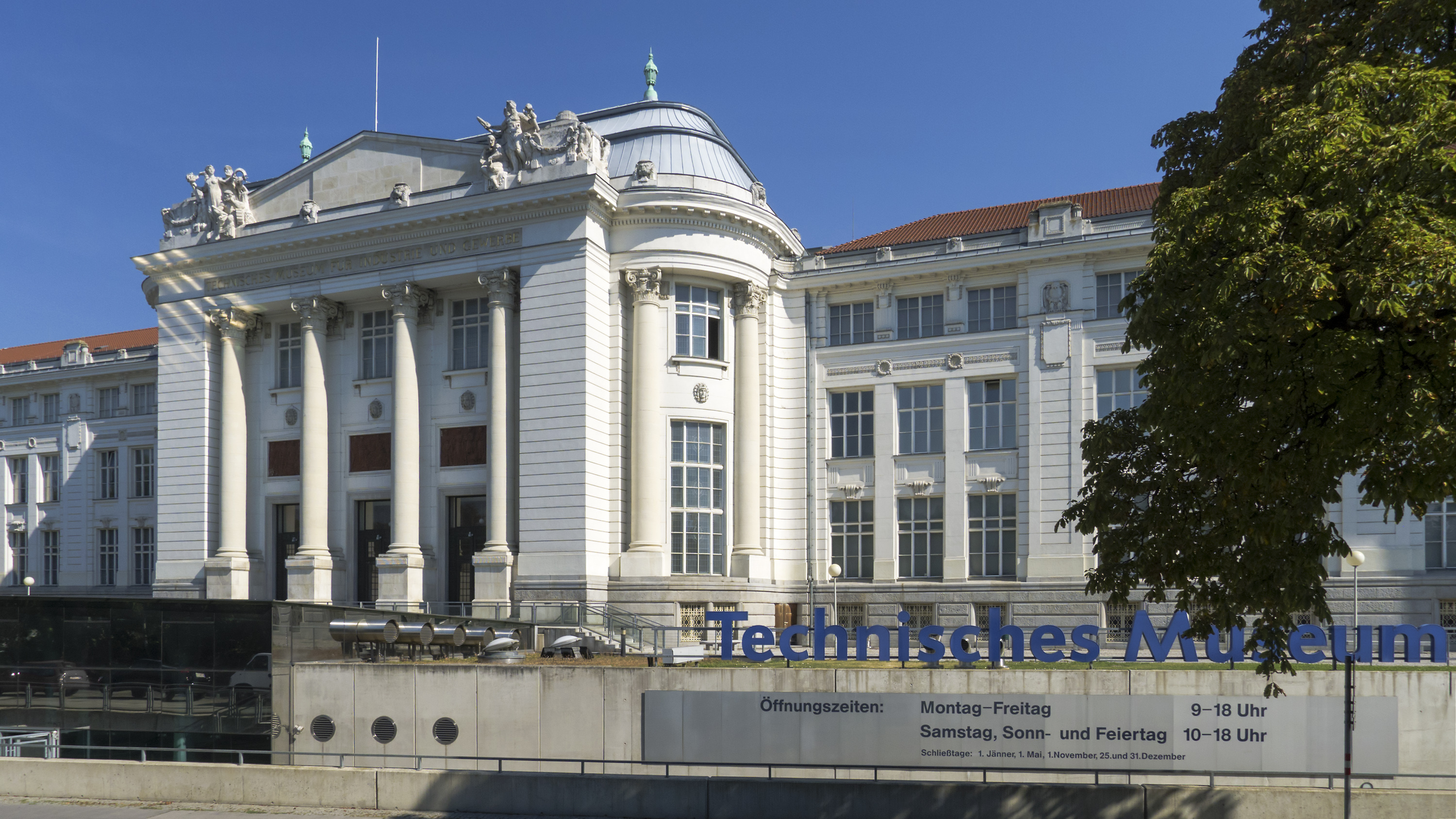 Technisches Museum in Wien 14, Mariahilfer Straße 212